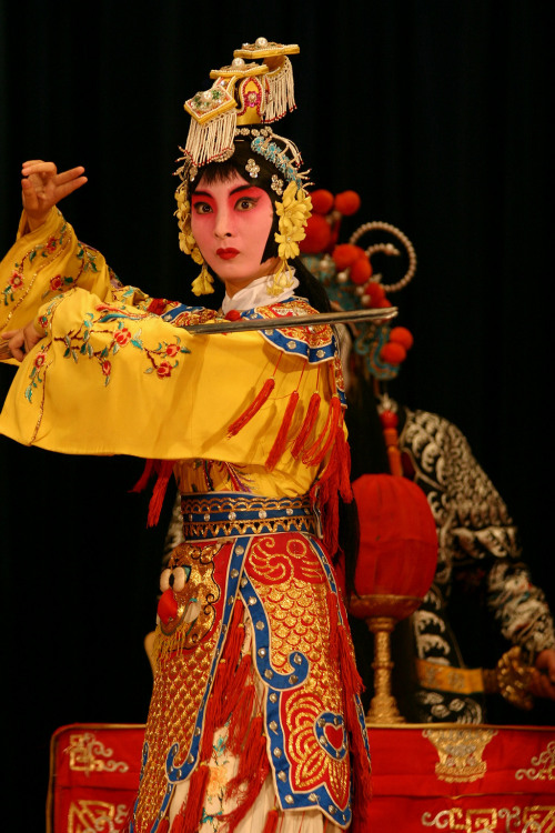 中文（中国大陆）: 2001年京剧队“京韵铿锵”专场演出《霸王别姬》。